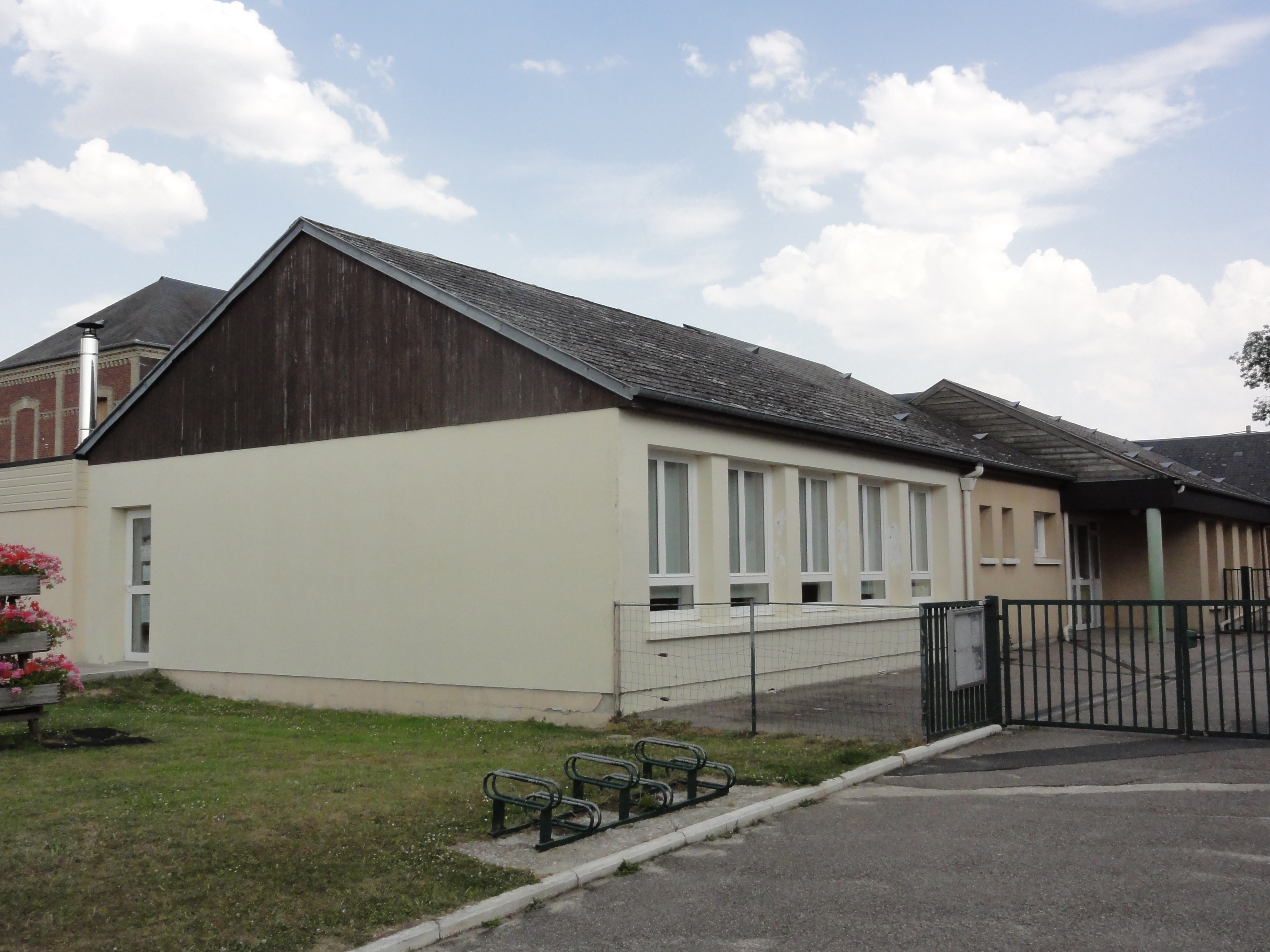 La Trinité-du-Mont (Seine-Mar.) école